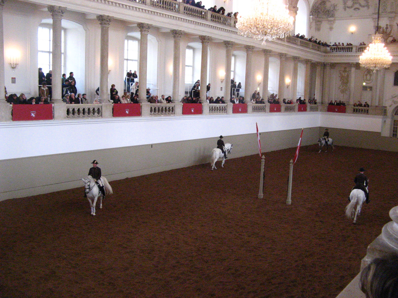 Vienna